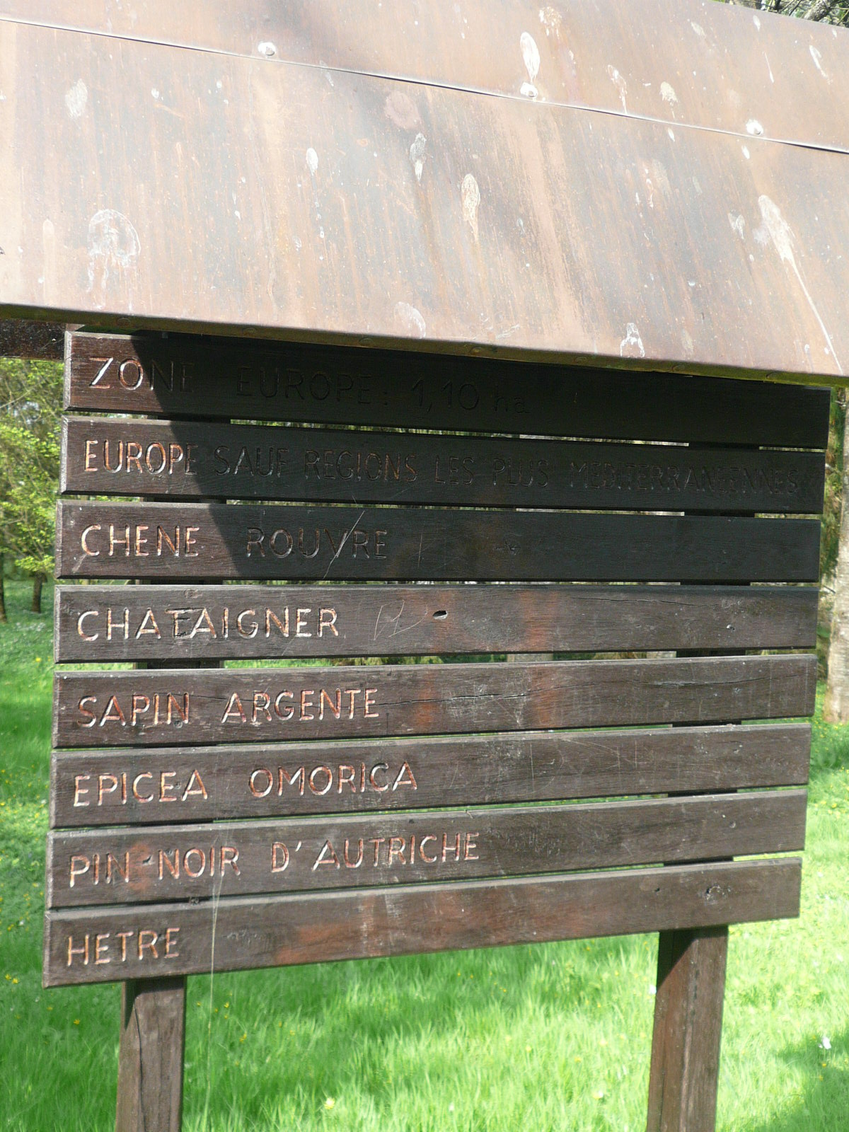 Arboretum côté Europe à Bourbonne-les-Bains